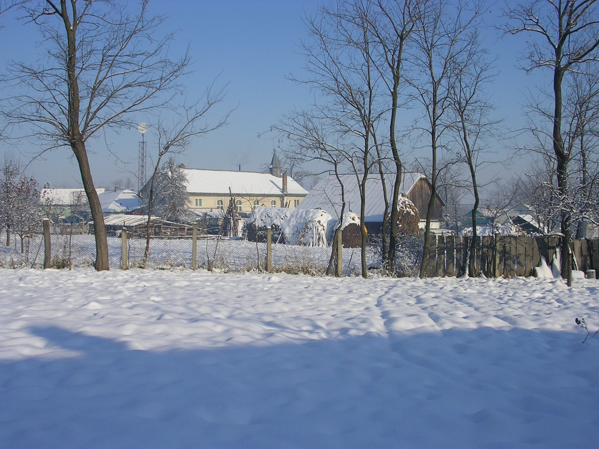 Iarna în comuna Dumbrăveni, judeţul Suceava